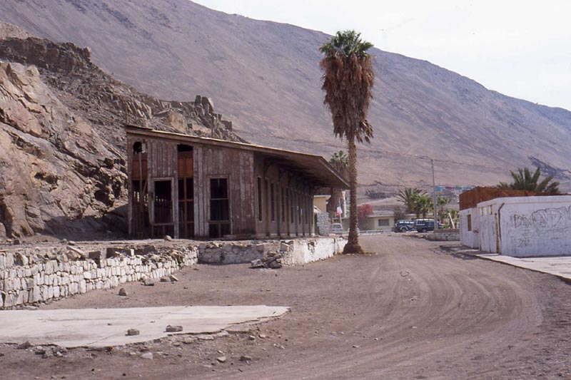 Ehemaliger Bahnhof und Reste des ehemaligen Gefangenenlagers.